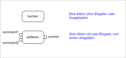 Aktion (UML2) - Beispiel 1